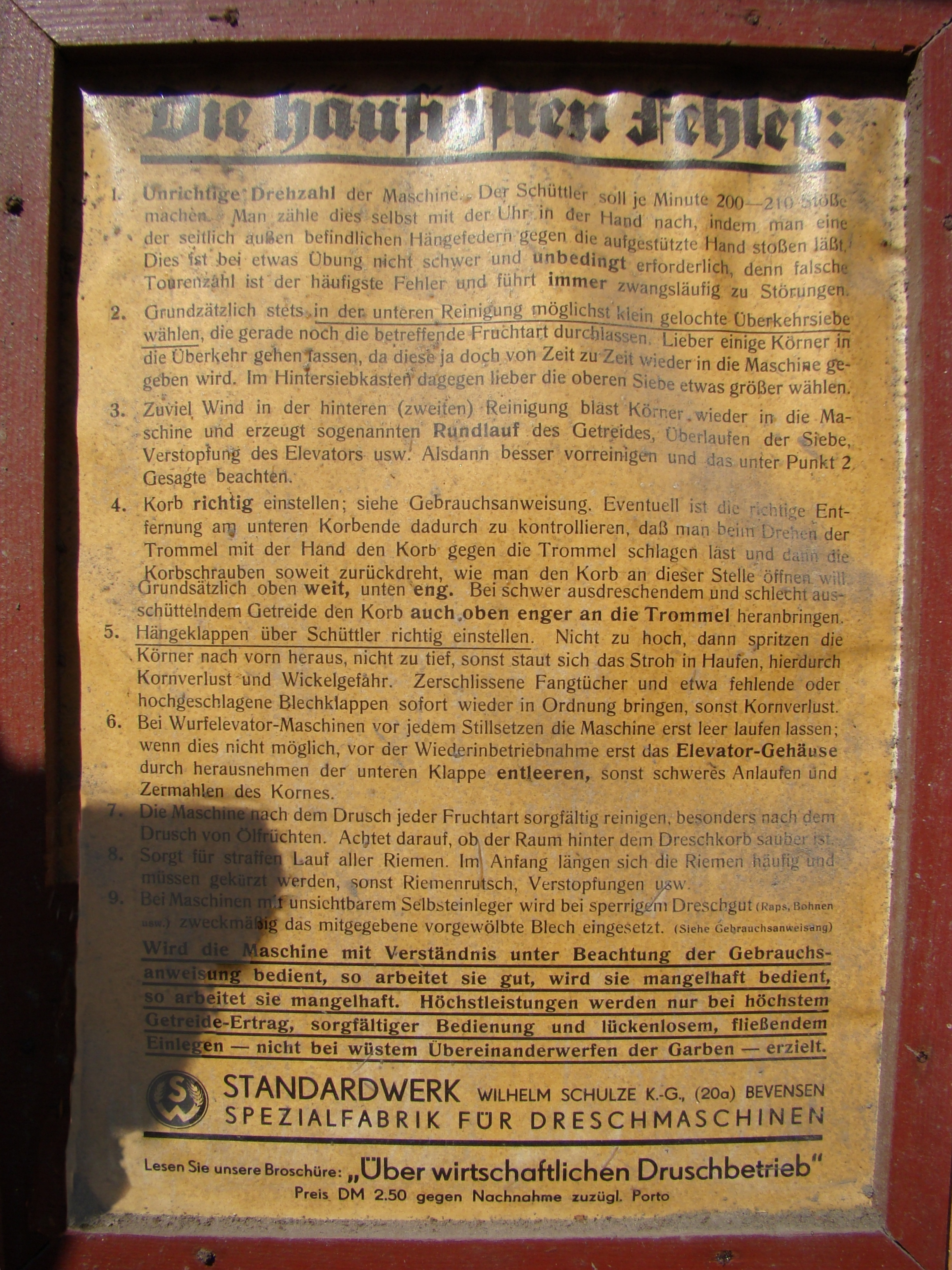 Gebrauchsanweisung für die Dreschmaschine Union 22 von den Standardwerken Wilhelm Schulze KG, Bevensen-Hannover